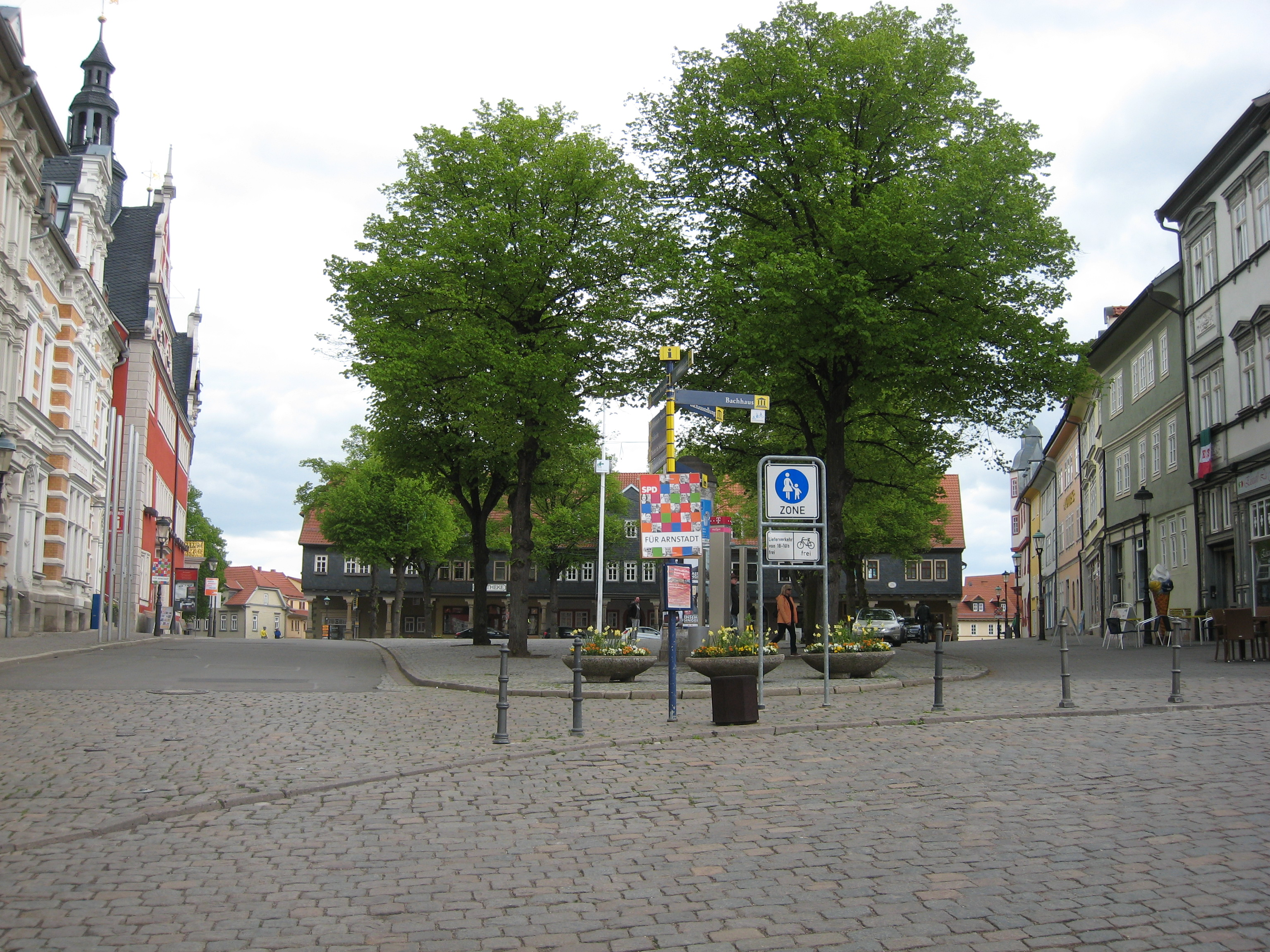 Marktplatz in Arnstadt, photopgraphiert vom Unteren Markt